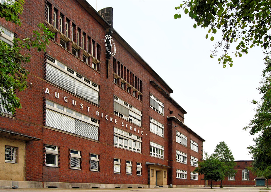 Gymnasium August-Dicke-Schule (Solingen)